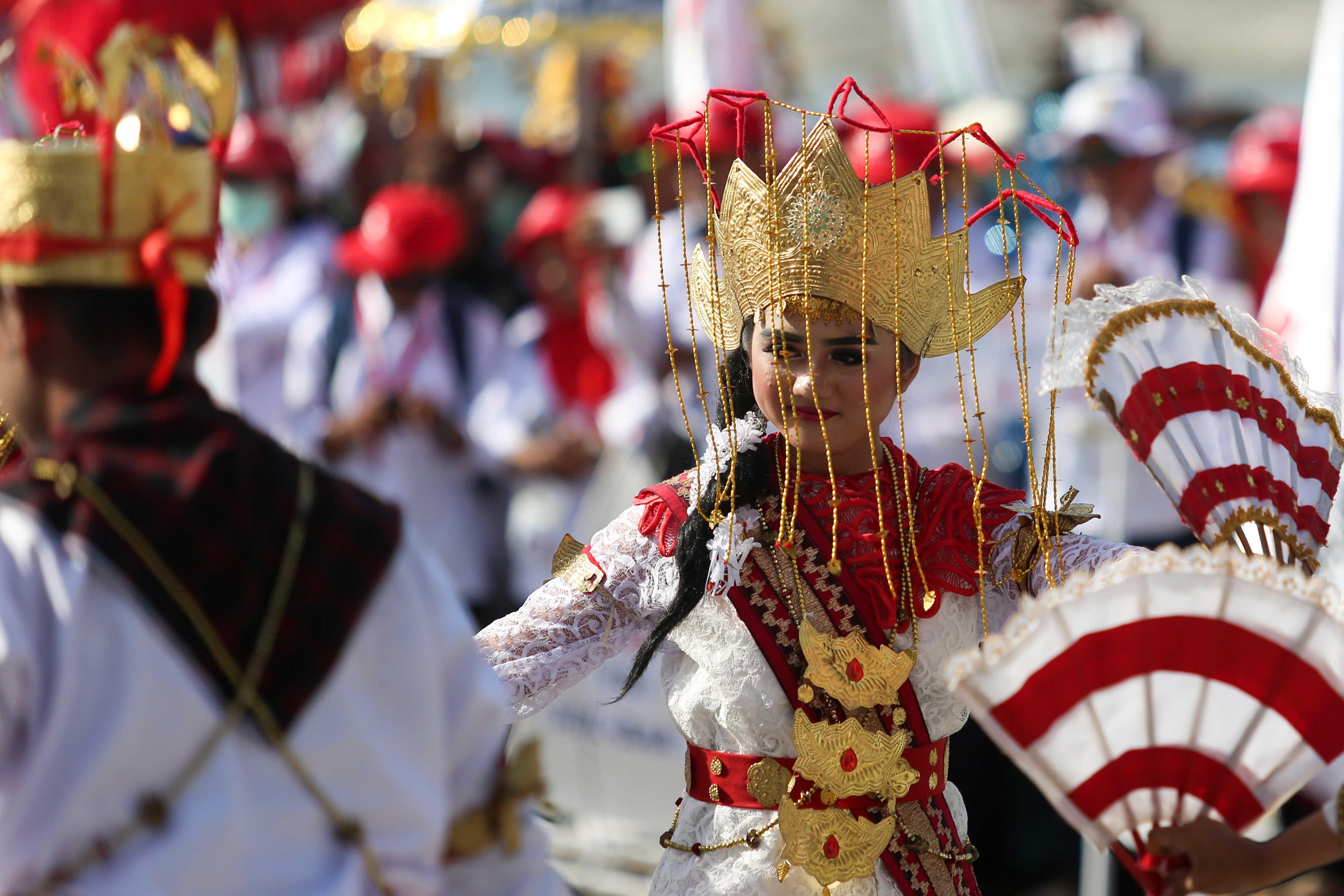 Tari Melinting yang berasal dari Lampung saat pembukaan Temu Karya PMI di Purwakarta (17/09)